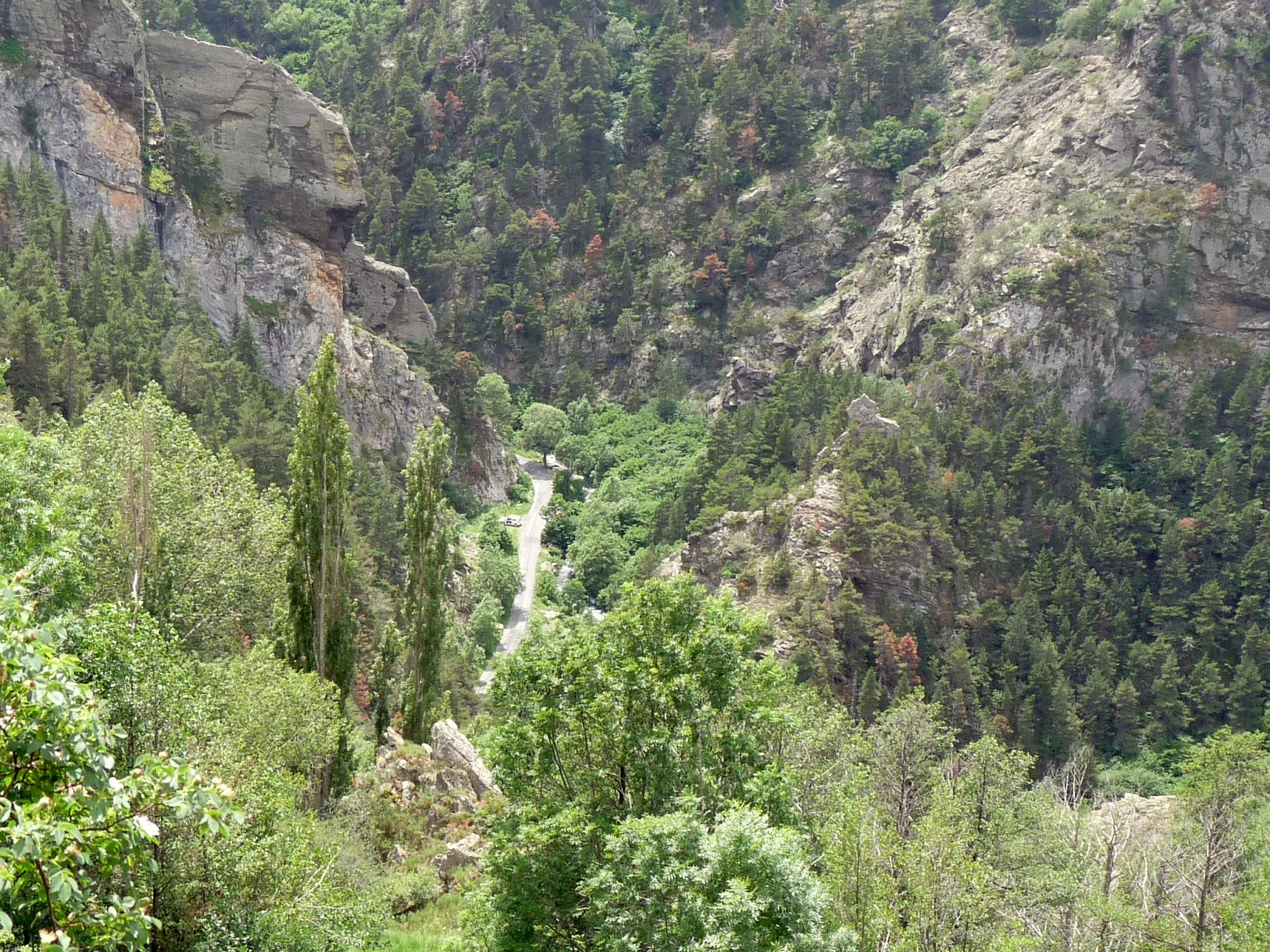 Gorges du Sègre, Llo, Pyrénées-Orientales, France